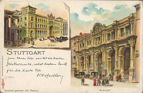 Centralbahnhof und Post in der Schloßstraße in Stuttgart (Postkarte)